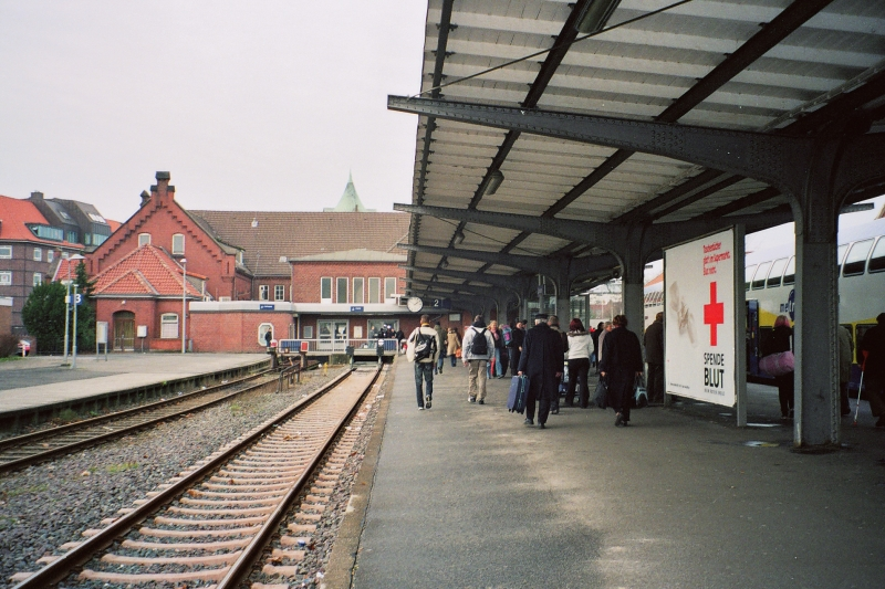 Bahnhof Cuxhaven, Ankunft eines Metronom-Zuges